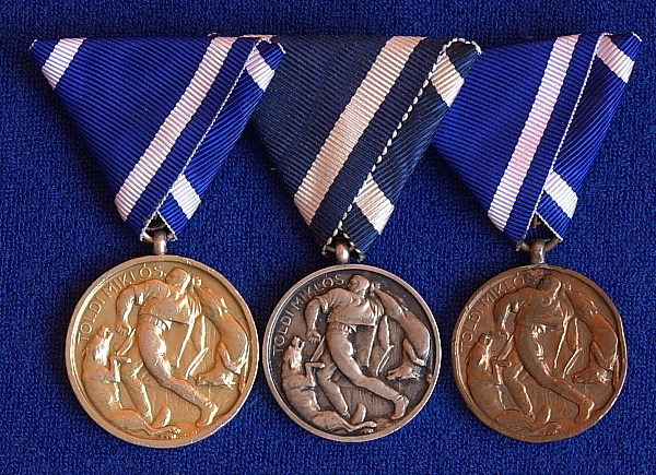 Arany- Ezüst- és Bronz Toldi Miklós Emlékérem